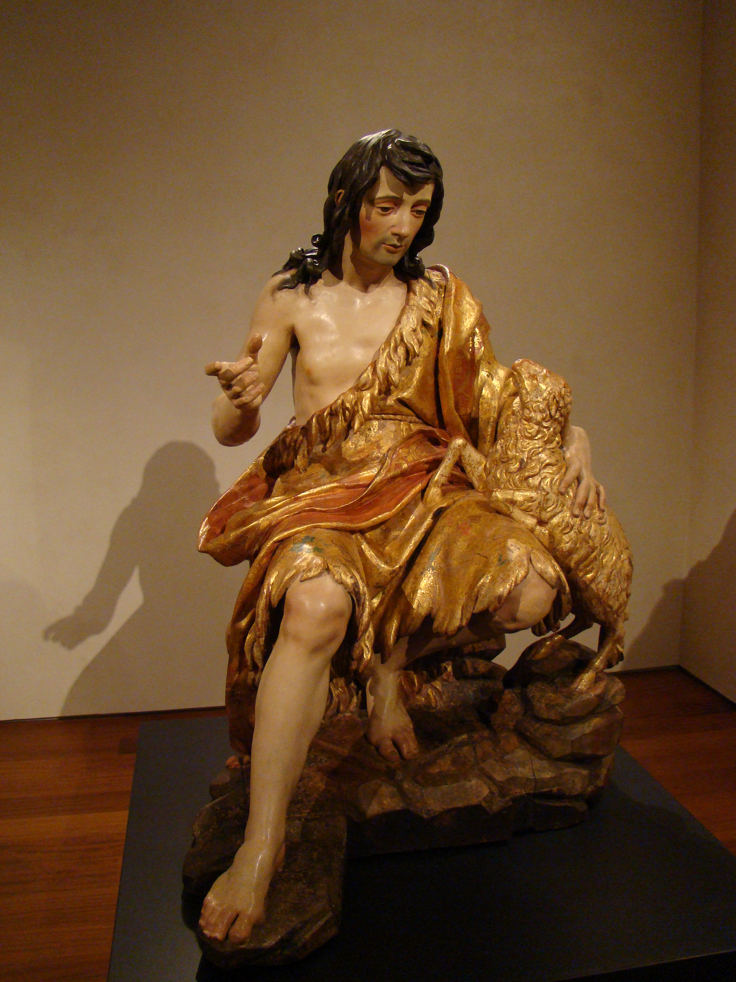 Escultura en madera policromada que representa a San Juan Bautista, obra del escultor barroco Alonso Cano (Granada, 19 de marzo de 1601 - 3 de octubre de 1667). La obra fue contratada en 1634 para el retablo mayor de la iglesia de Villana de San Juan de la Palma. En la actualidad se encuentra custodiada en el Museo de Escultura de Valladolid.